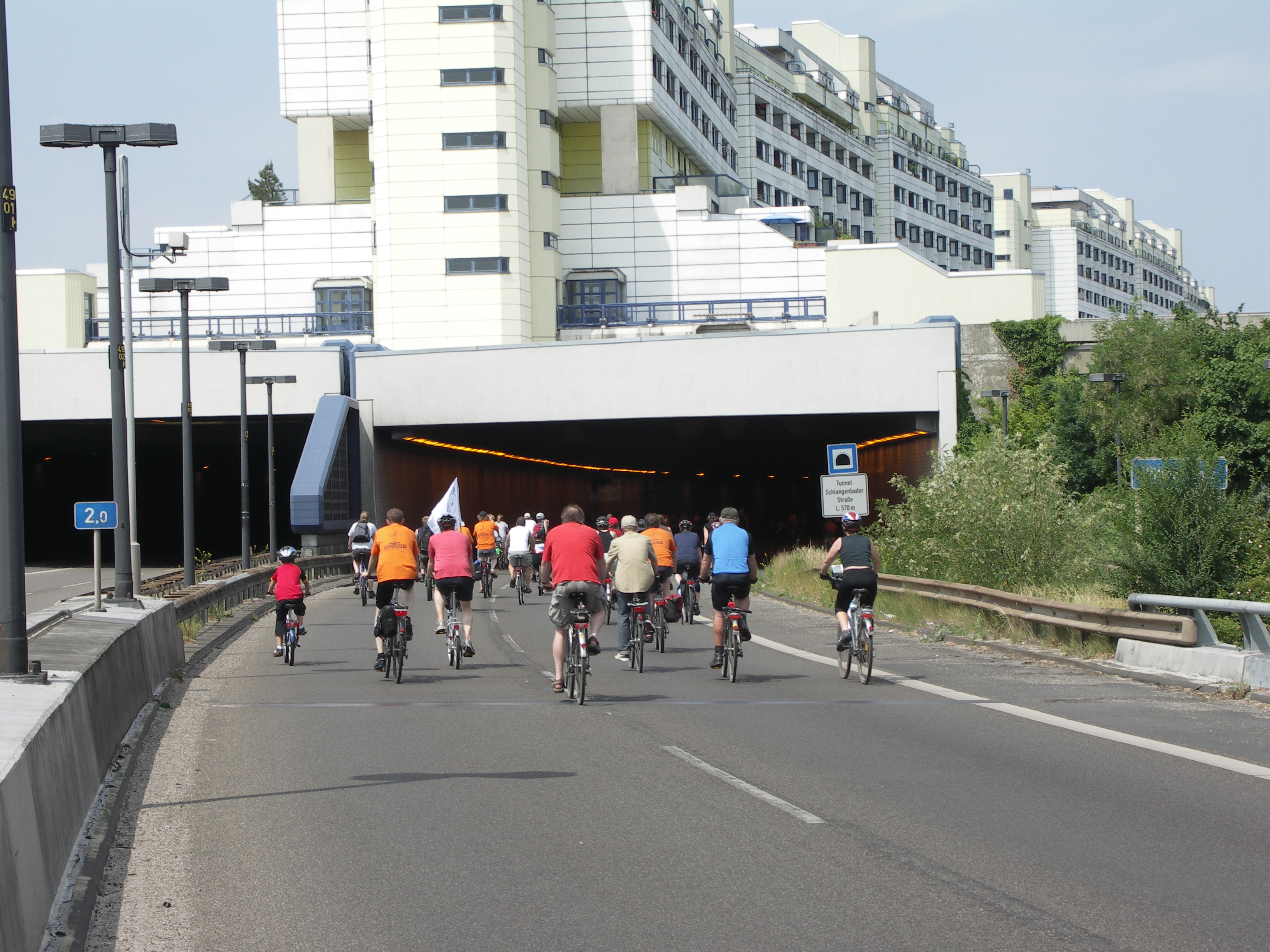 32. Fahrradsternfahrt des ADFC Berlin e. V., Fahrt auf der Bundesautobahn 104 in nördlicher Richtung vor Einfahrt in den Tunnel Schlangenbader Straße